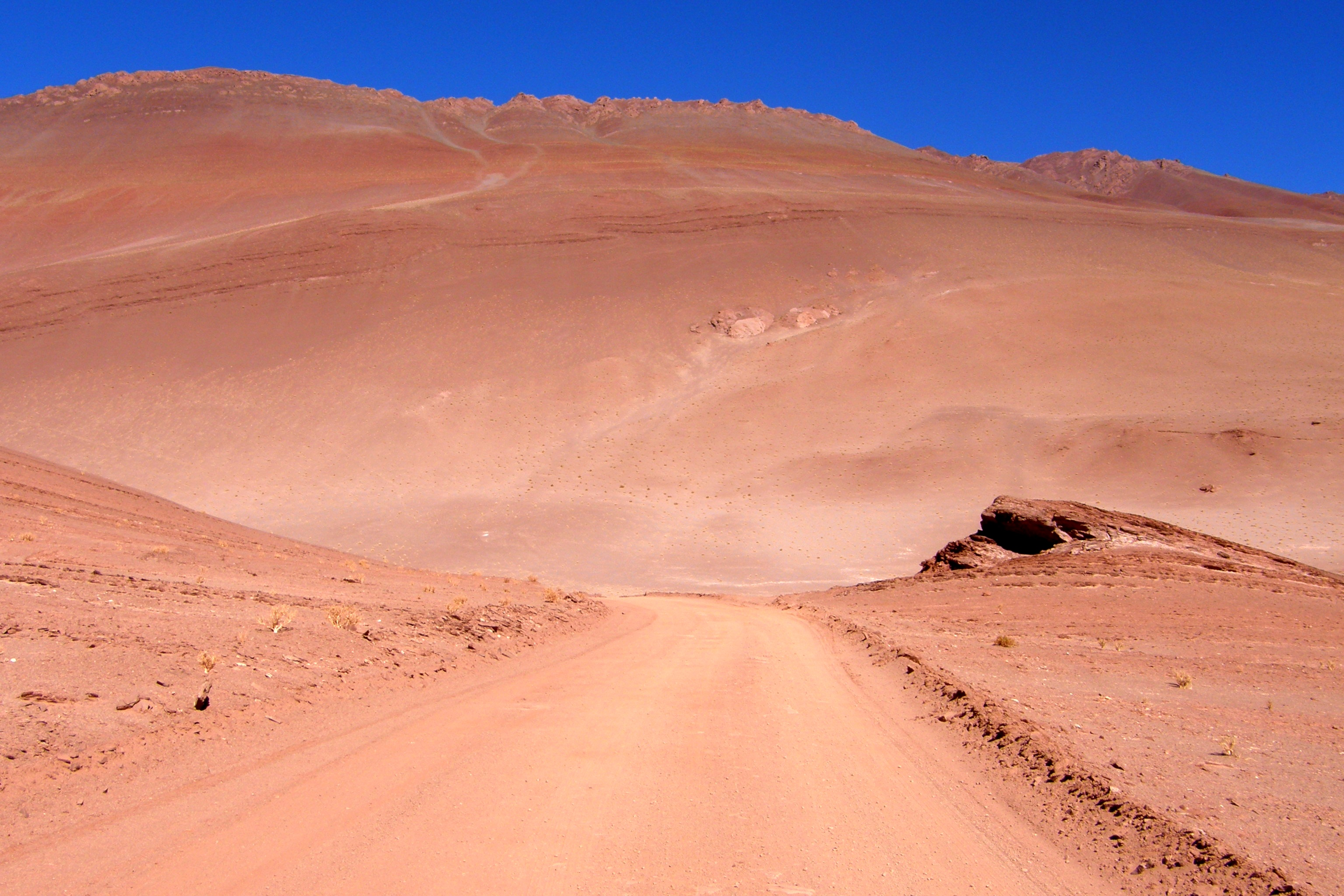 Aux abords de la Sierra de Calaste, Route provinciale n° 27, proche de Tolar Grande, departamento de Los Andes, Provincia de Salta, Argentina